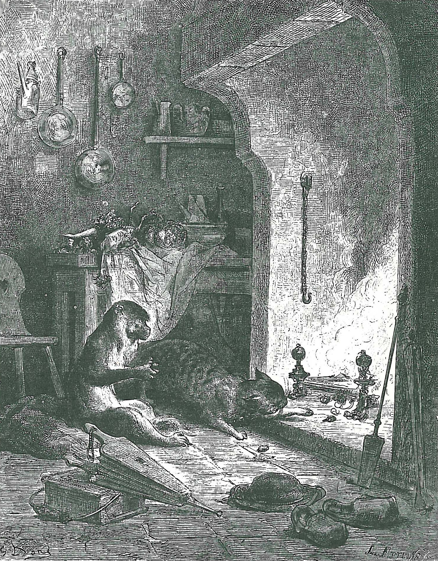 illustration for Jean de La Fontaine's fables by Gustave Doré